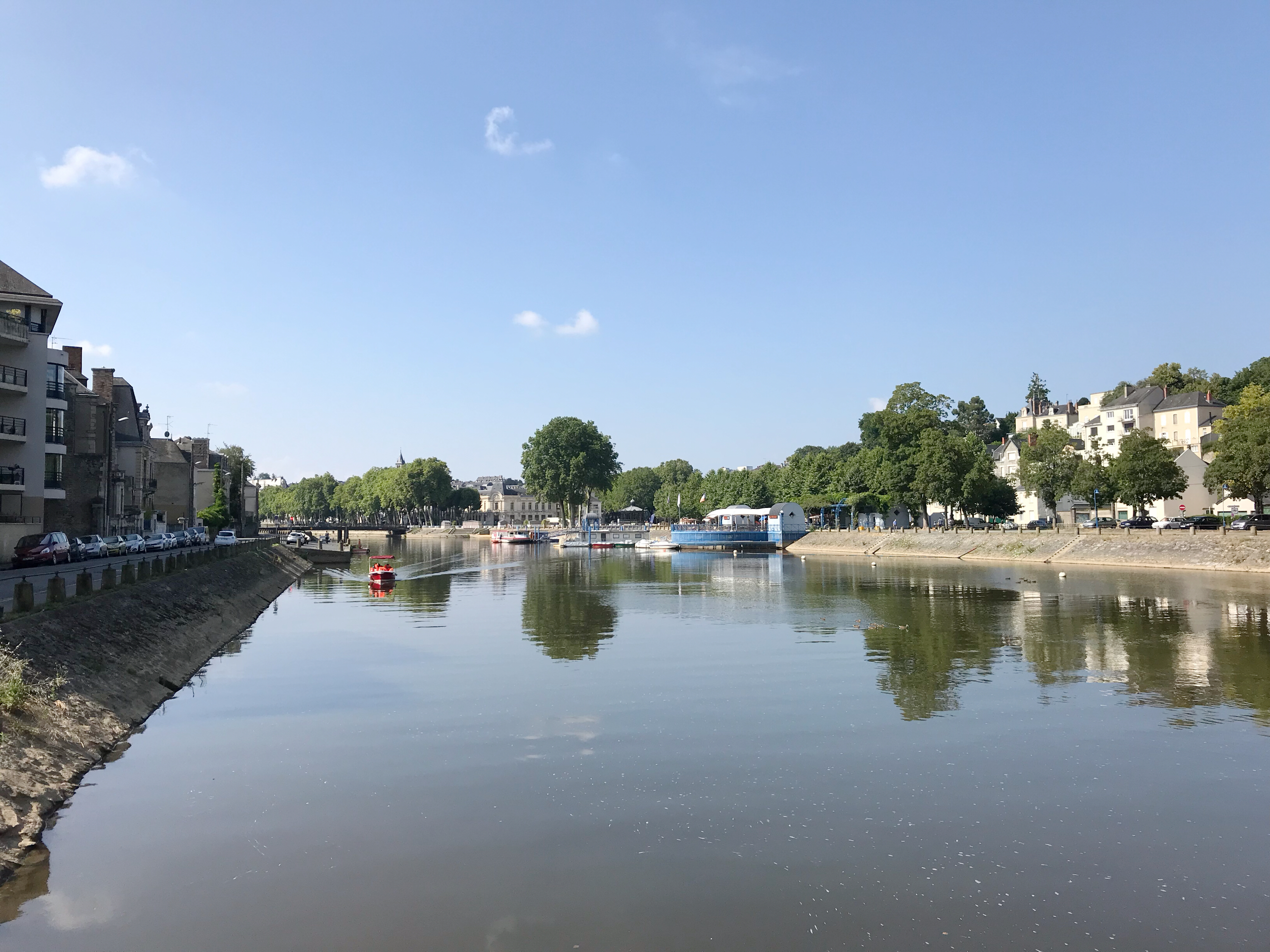 Le fleuve de la Mayenne à Laval